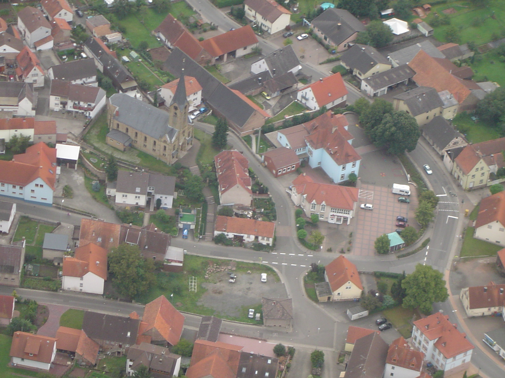 Der Dorfplatz von Olsbrücken aus der Vogelperspektive! Quelle: Selbst gemacht